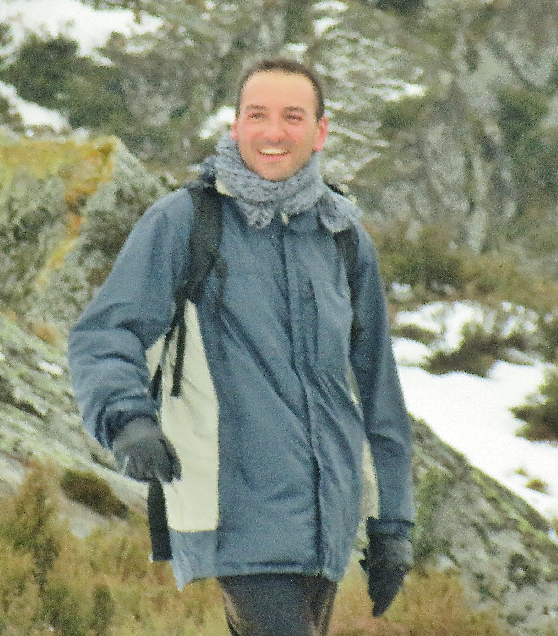 Paül Carril en las montañas de Trevinca, en Galicia